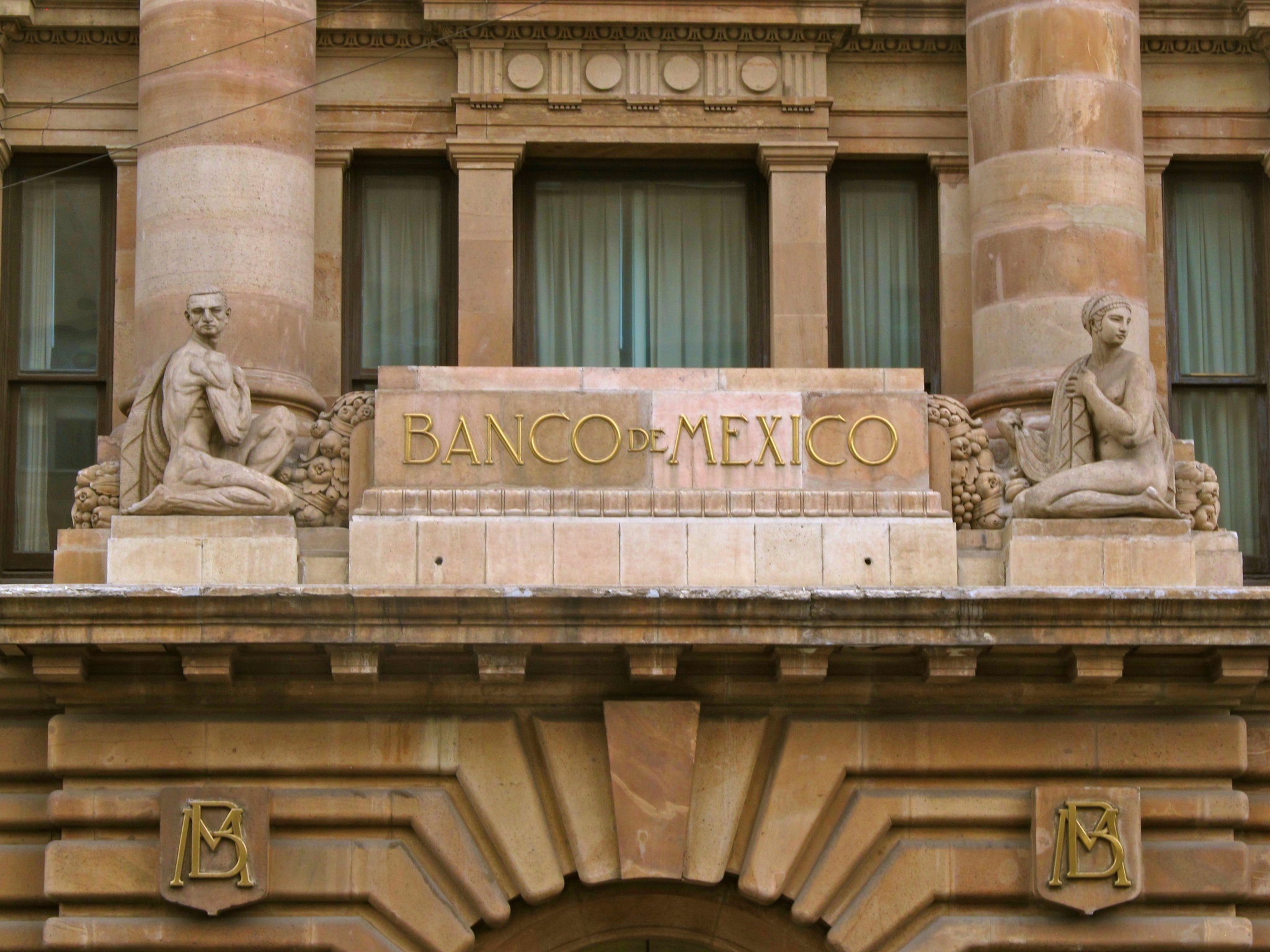 El Banco de Mexico